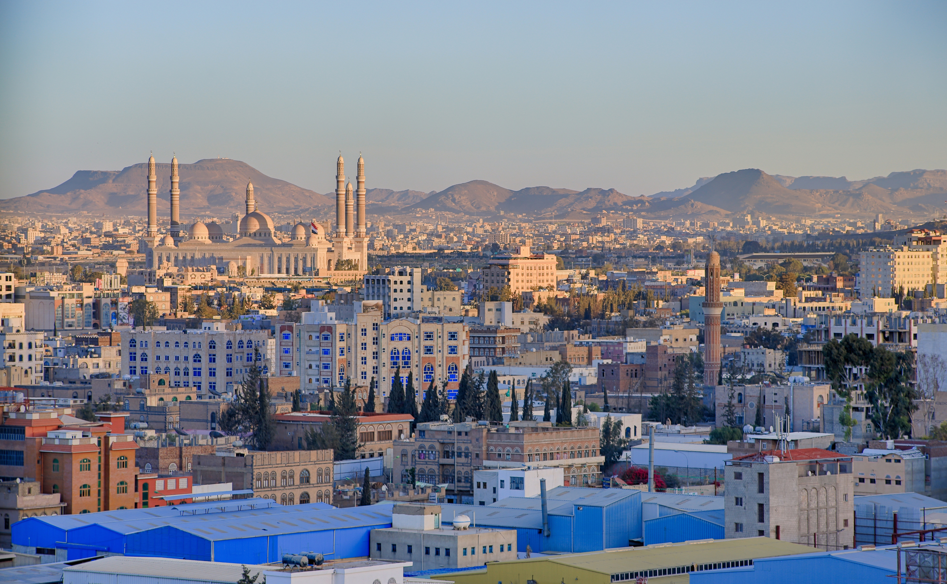 By: AnasALhajj.Photography